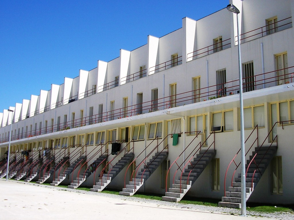 Bairro da Bouça from Alvaro Siza Vieira, Porto, Portugal